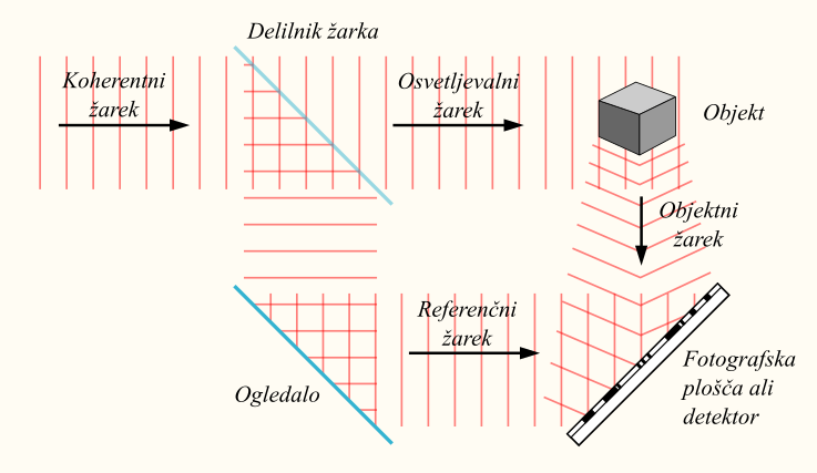 Skica snemanja holograma, povzeta po angleški Wikipediji s prevedenim tekstom. Originalna verzija: DrBob at the English language Wikipedia [GFDL ( or CC-BY-SA-3.0 ( via Wikimedia Commons